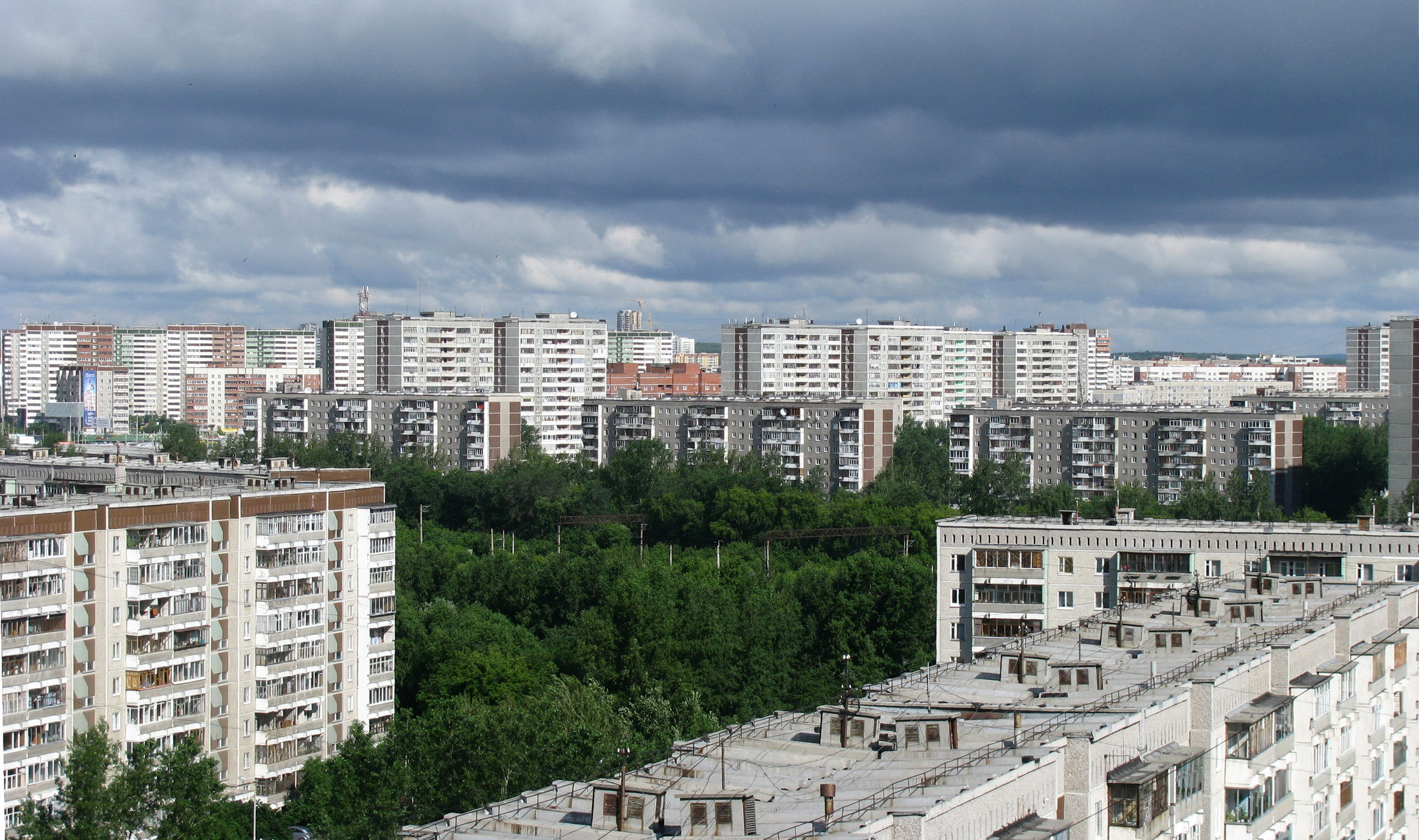 Екатеринбург. Микрорайон Новая Сортировка